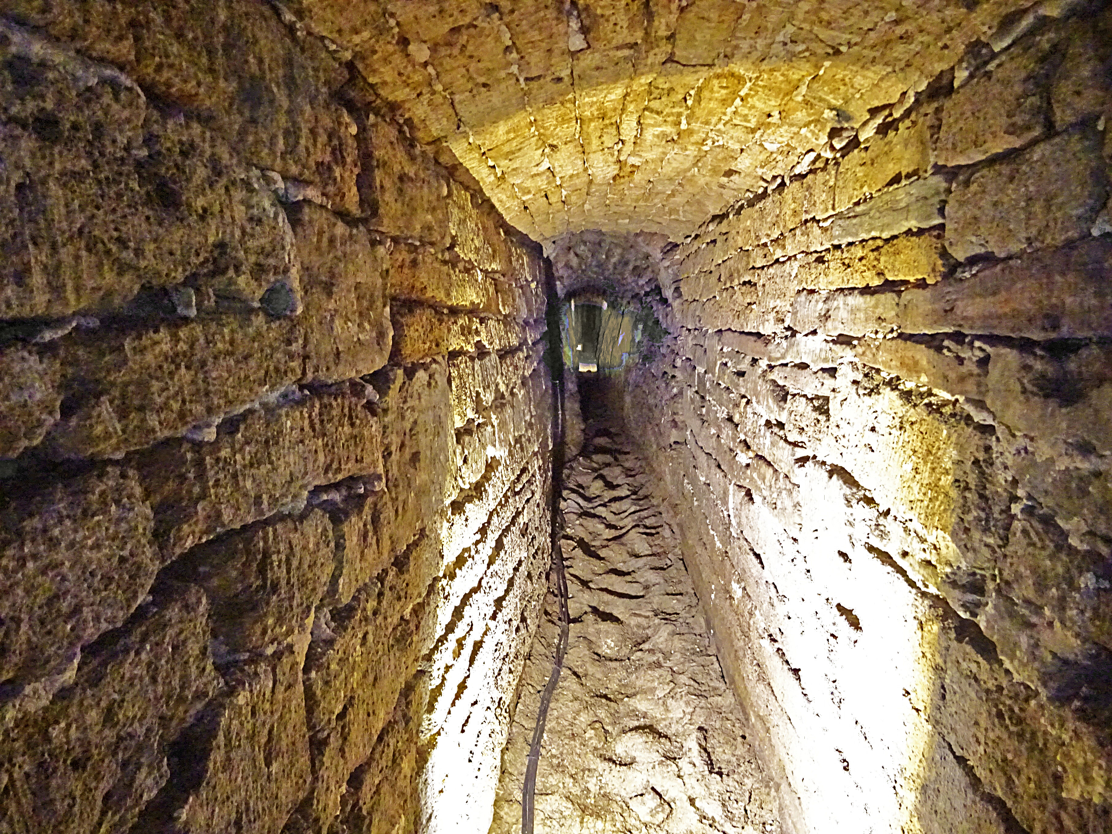 Wasserversorgung und Mühlenzuleitung unter dem Mark in Weißensee (Thüringen)